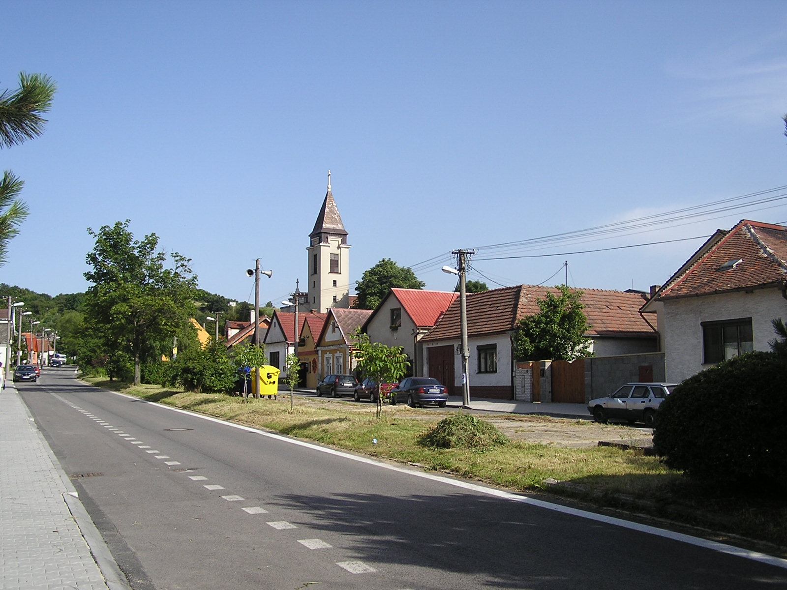 Vrančovičova ulica v Bratislave, v pozadí kostol sv. Margity